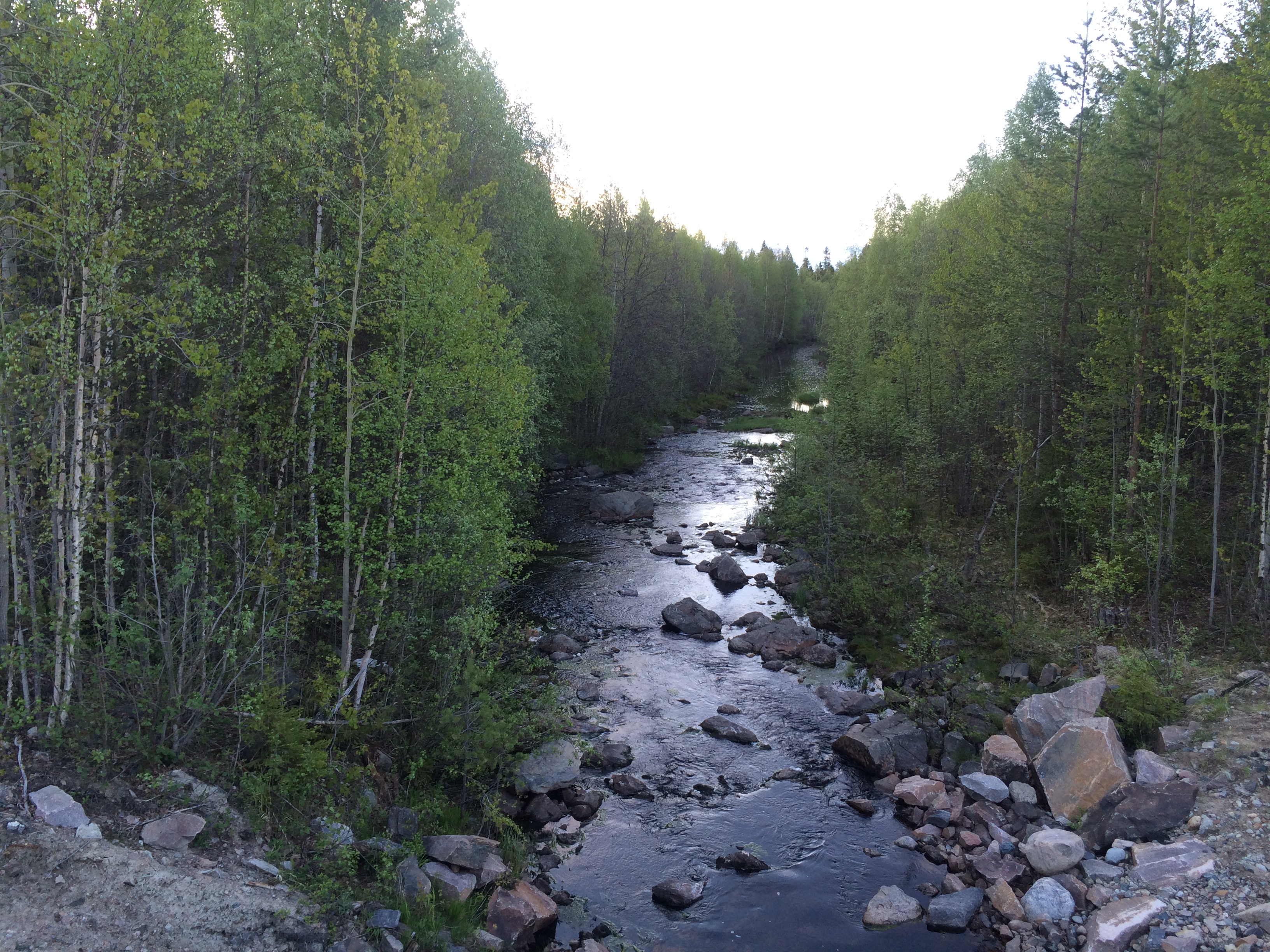 Викшречка (Егут)